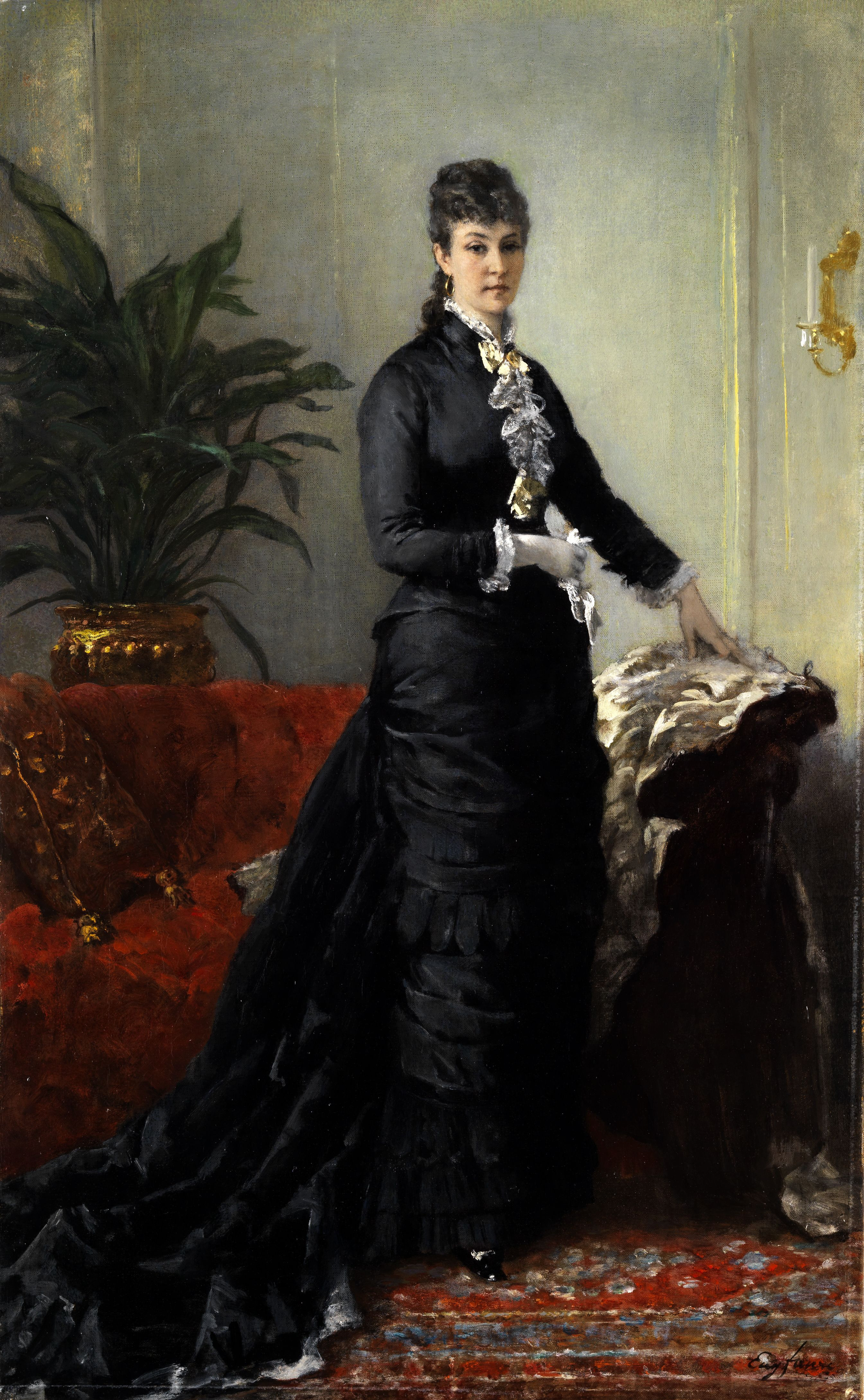 Junge Frau in langem schwarzen Kleid